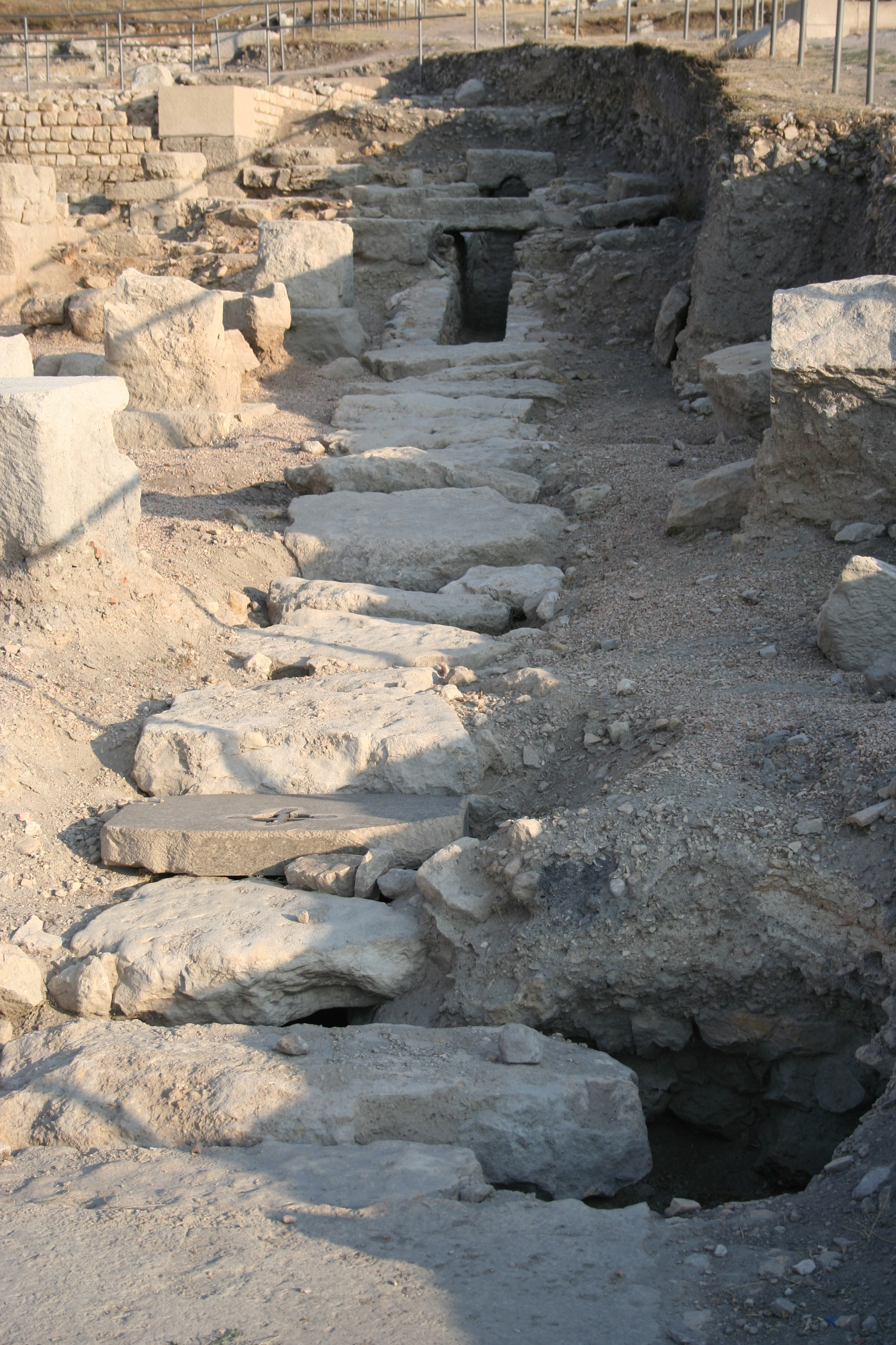 Descubrimiento de una canalización de desagüe